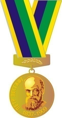 Ведомственная награда Минспорта РФ - Медаль Петра Лесгафта